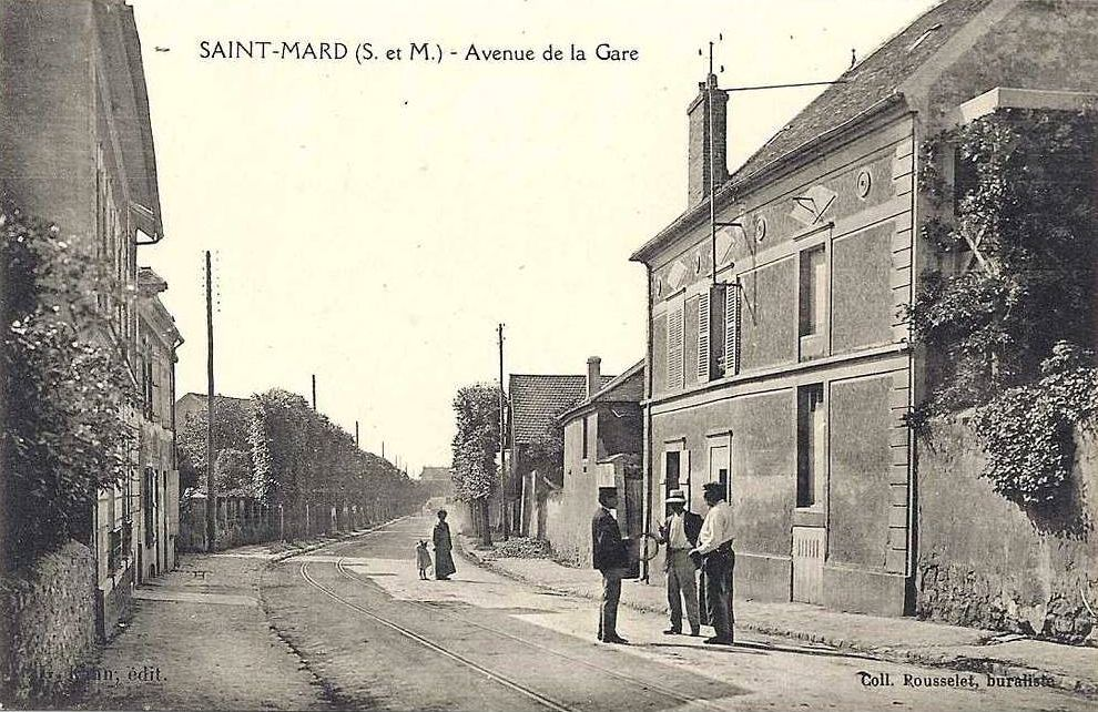 L'avenue de la gare à Saint-Mard avec les rails du tramway de Meaux à Dammartin ; la gare se situe au fond de la rue.